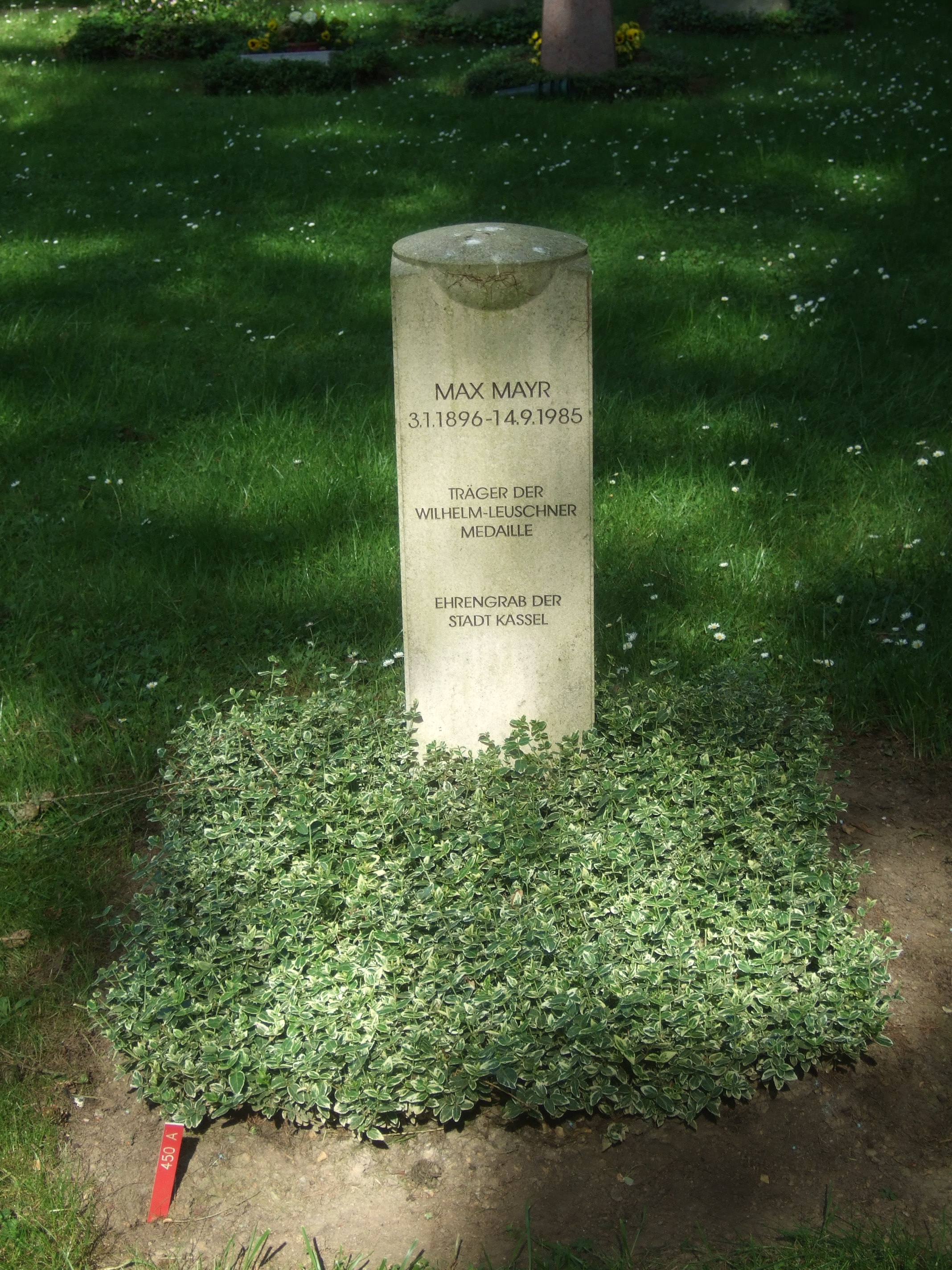 Grab von Max Mayr (1869-1985) auf dem Hauptfriedhof Kassel.